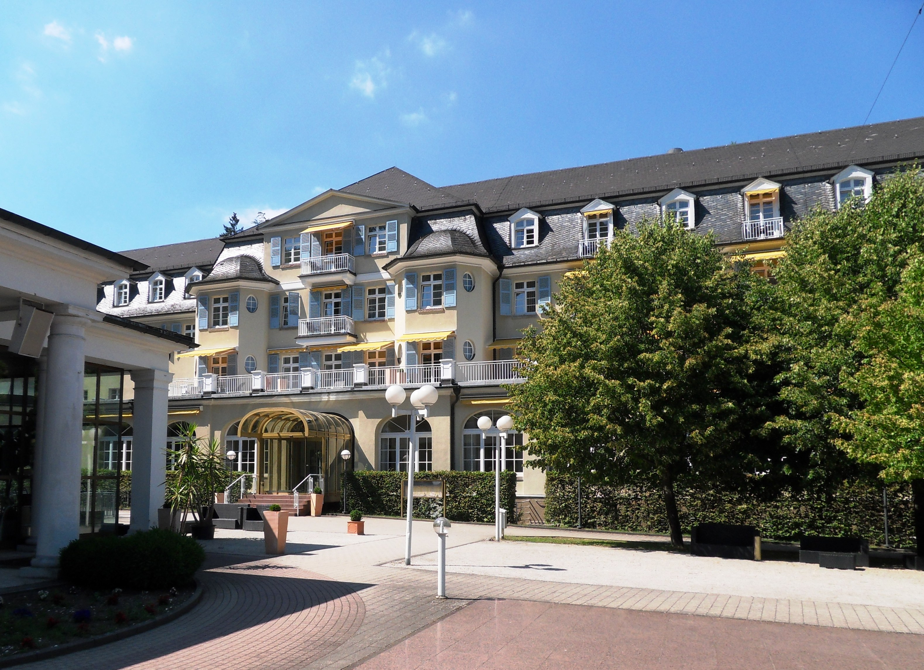 Parkhotel in Schlangenbad. Es wurde 1912 nach Plänen des Frankfurter Architekten E. Rückgauer als Staaliches Kurhotel errichtet und vereinigt die Funktionen von Kurhaus, Hotel und Bad unter einem Dach. Die Hauptfront ist nach Süden zum Kurgarten und zur Kolonnade ausgerichtet.